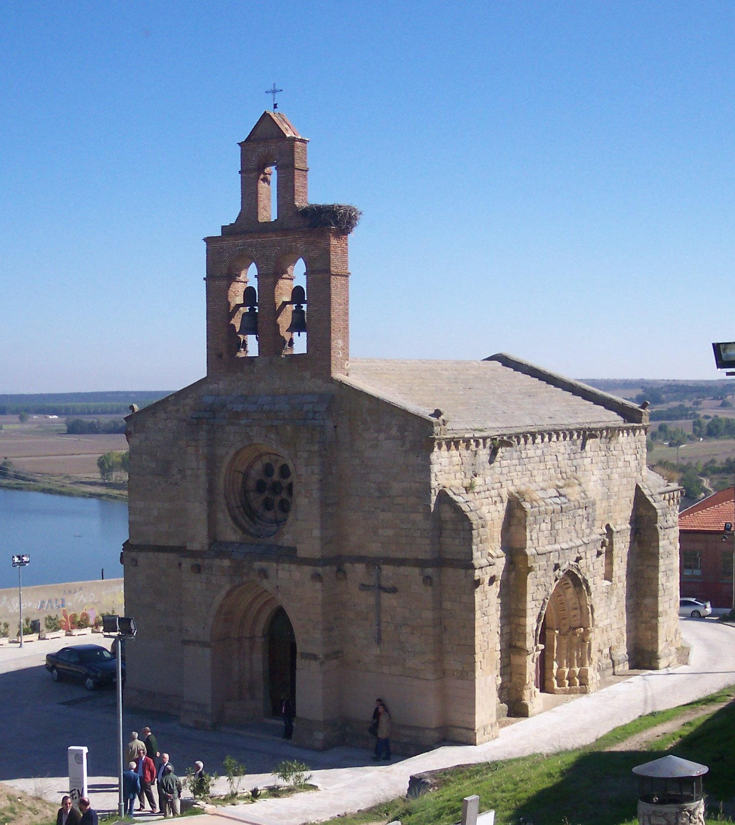 Iglesia de Santa María del Castillo en Castronuño (Valladolid, Castile and León).